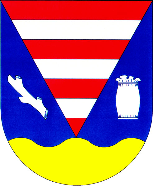 Znak obce Žichovice